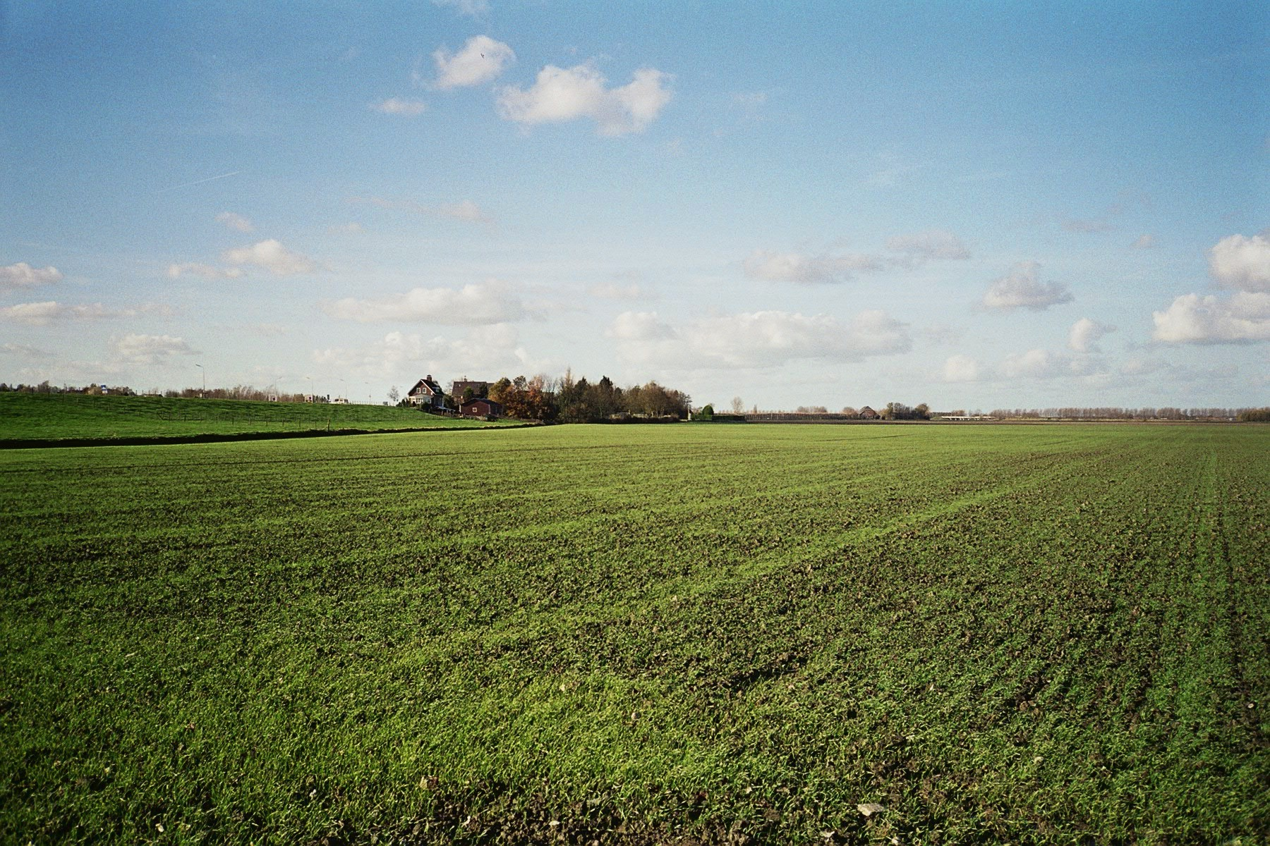 Haarlemmermeerpolder